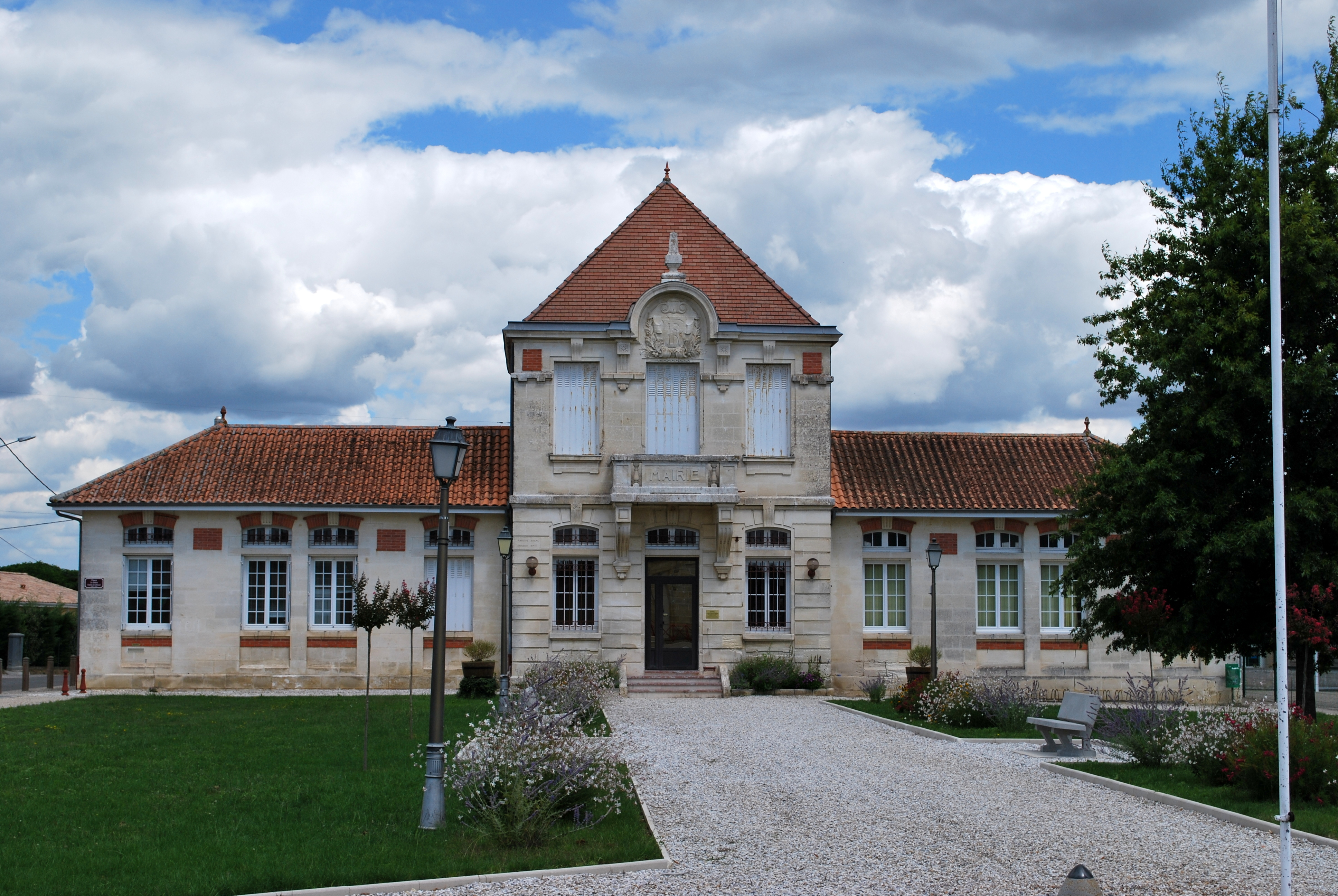 Saint-Genès-de-Fronsac